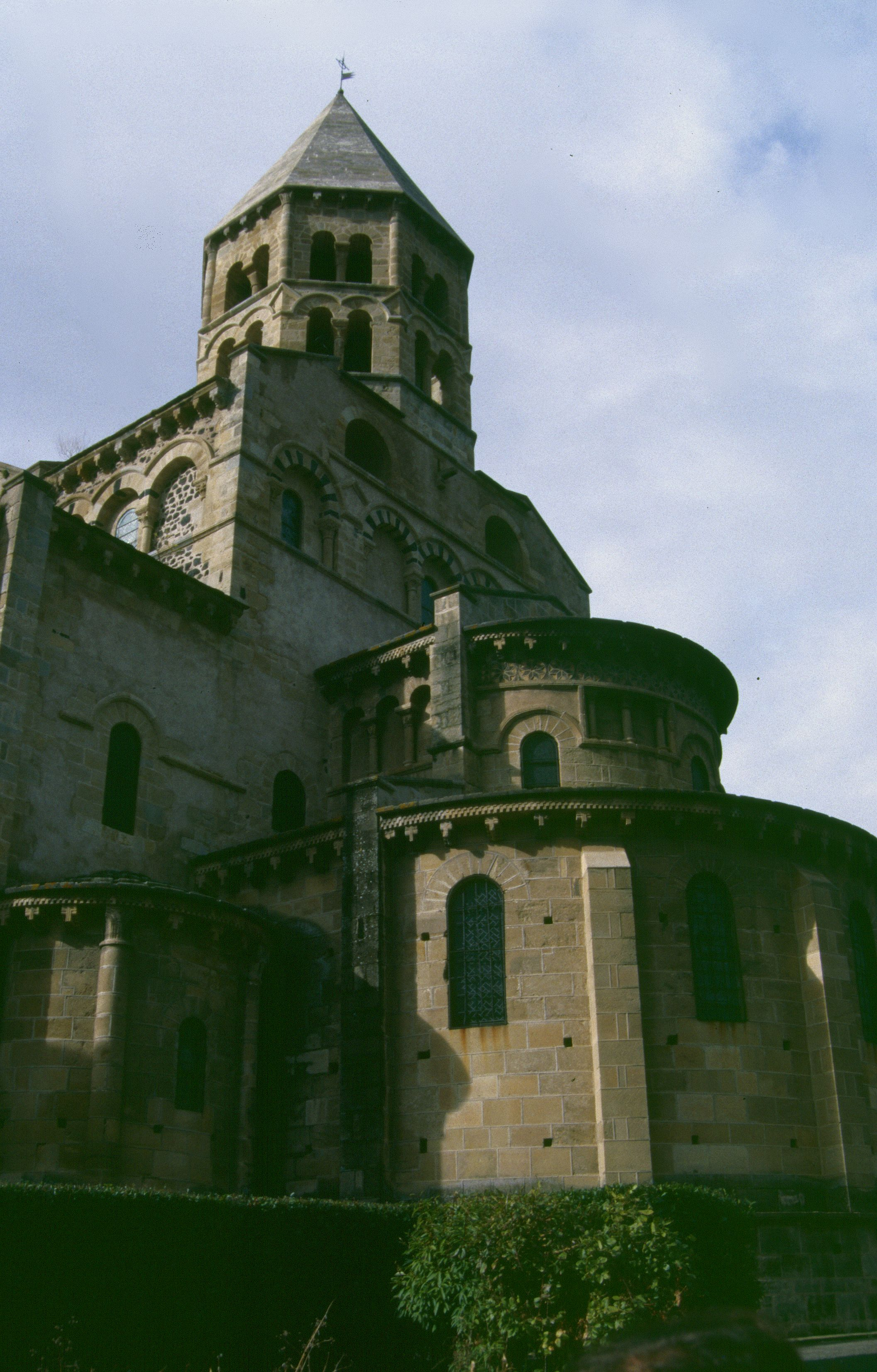 Saint Saturnin